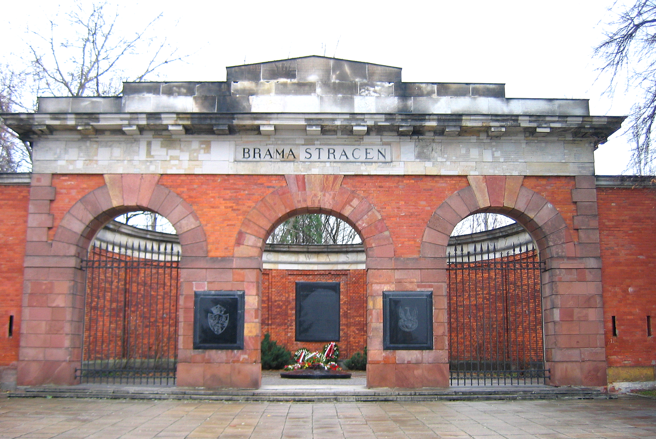 Executions Gate of Warsaw Citadel photo by User:Mathiasrex Maciej Szczepańczyk